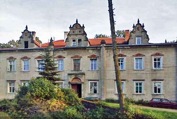 Zaręba Dolna, ul. Bazaltowa 3 - pałac, XVIII, 1849.